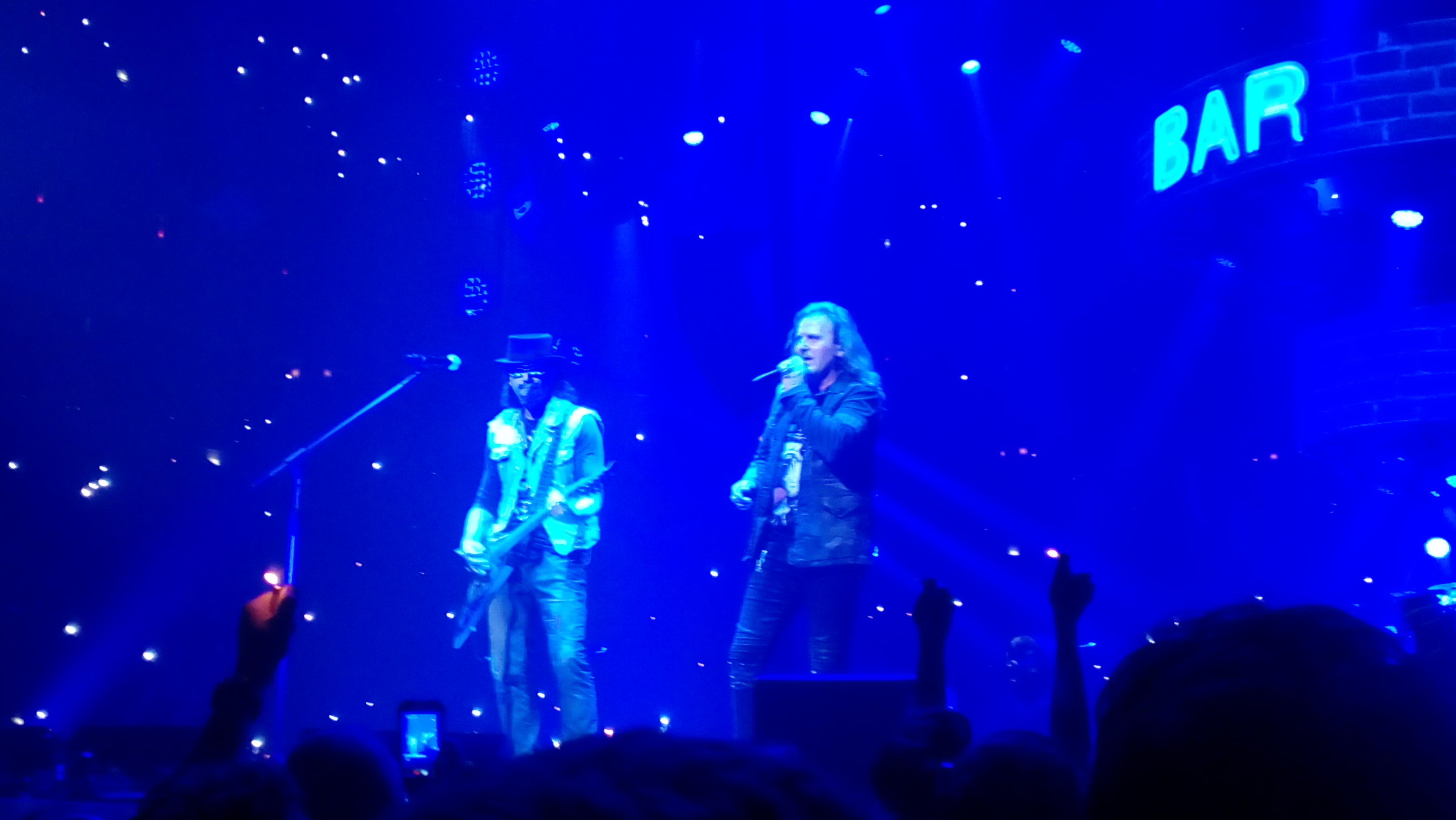 Skupina Kabát během vyprodaného koncertu v pražské O2 areně 28. 11. 2017